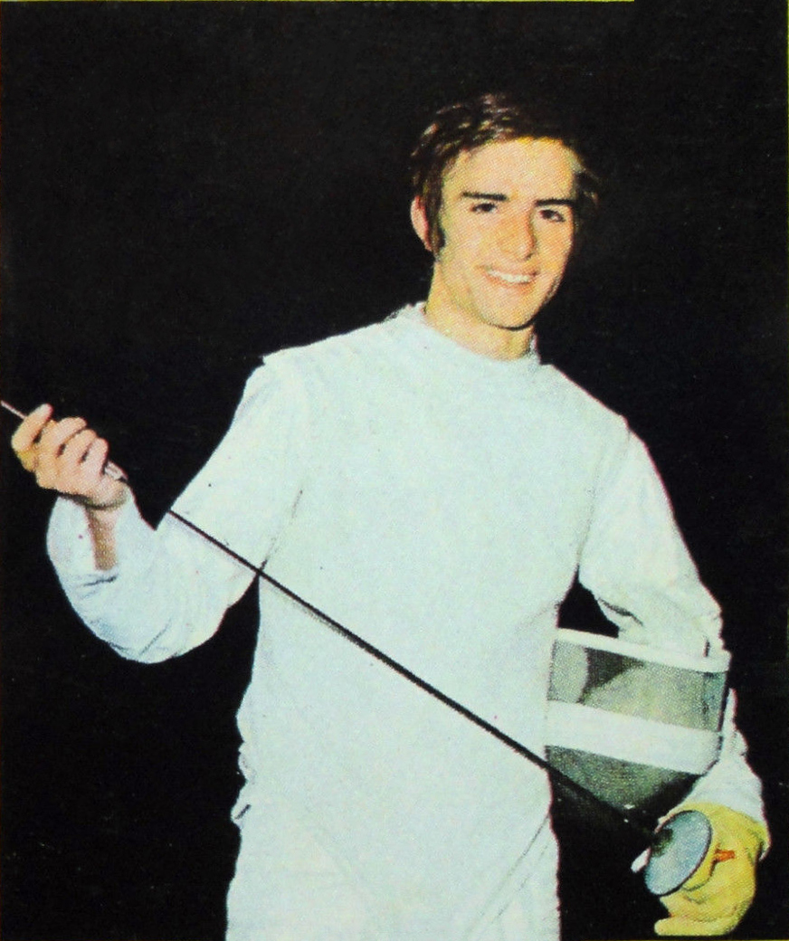 MUNCHEN 72-Figurina-Stickers-Panini-N° 32-DABROWSKI recuperata